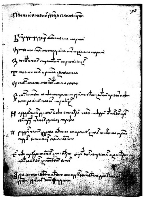 Найстарэшы захаваны беларускі запіс гімна “Багародзіца”, 1529 г.